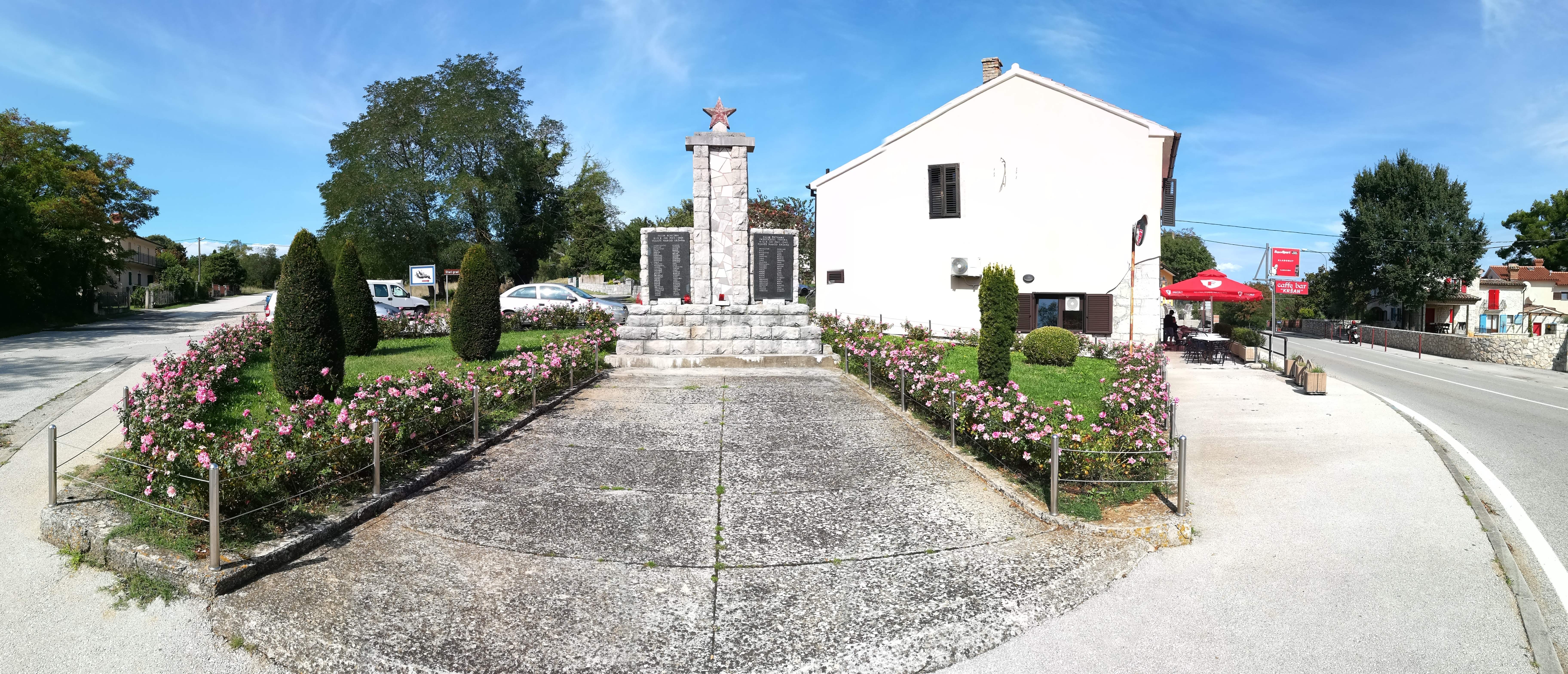 Monumento in ricordo dei soldati caduti nel 1943 - 1945 per contrastare il "terrore fascista" (recita una scritta).